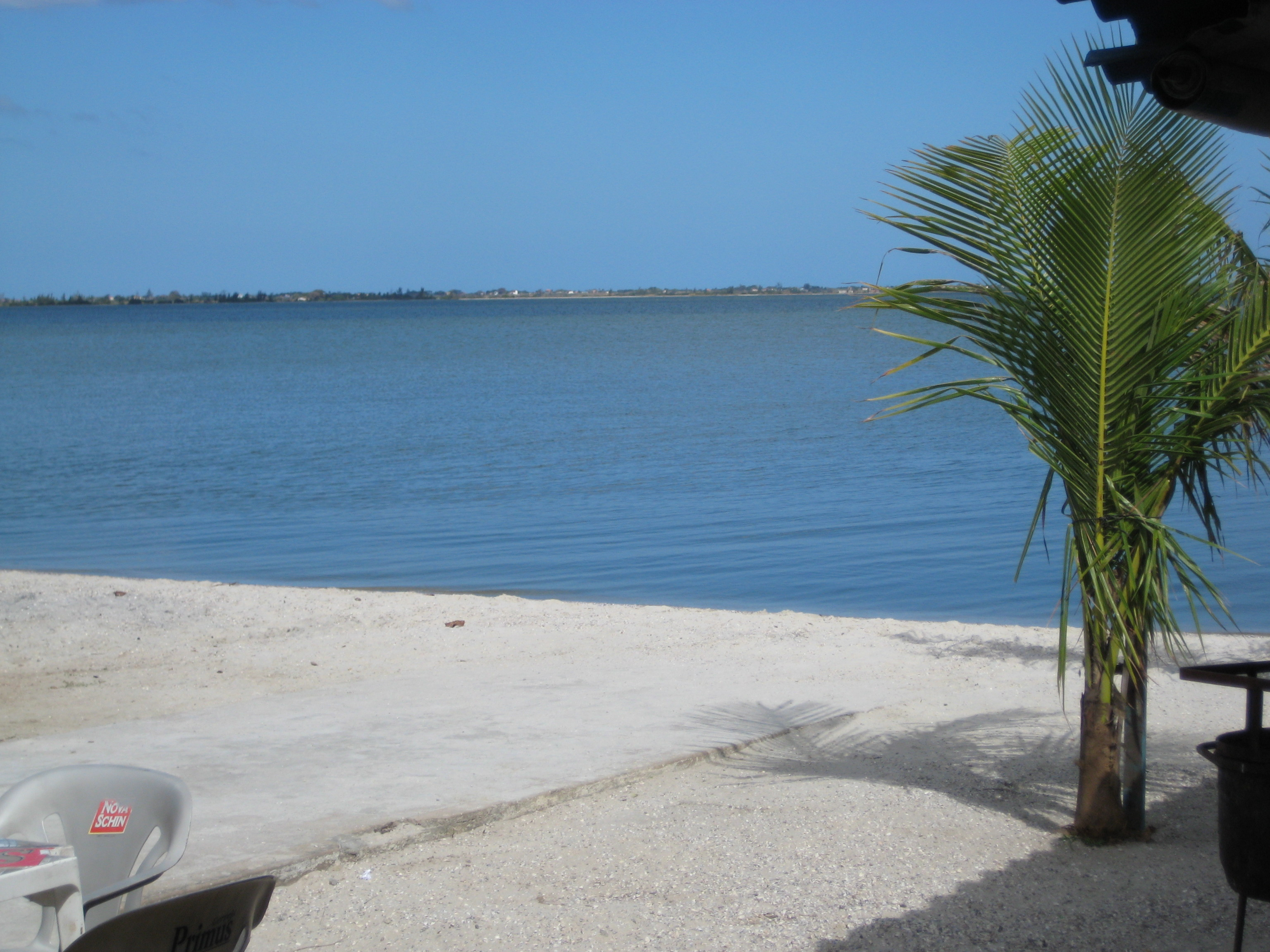 Caribe? Não, é na Pontinha